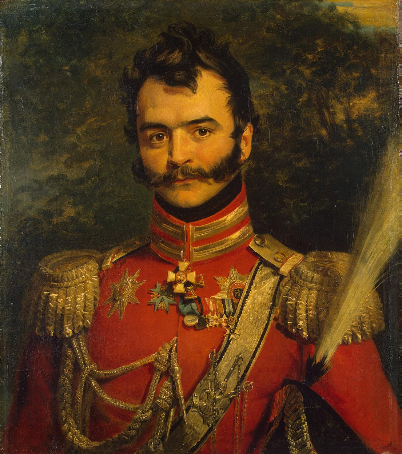 Ордов-Денисов